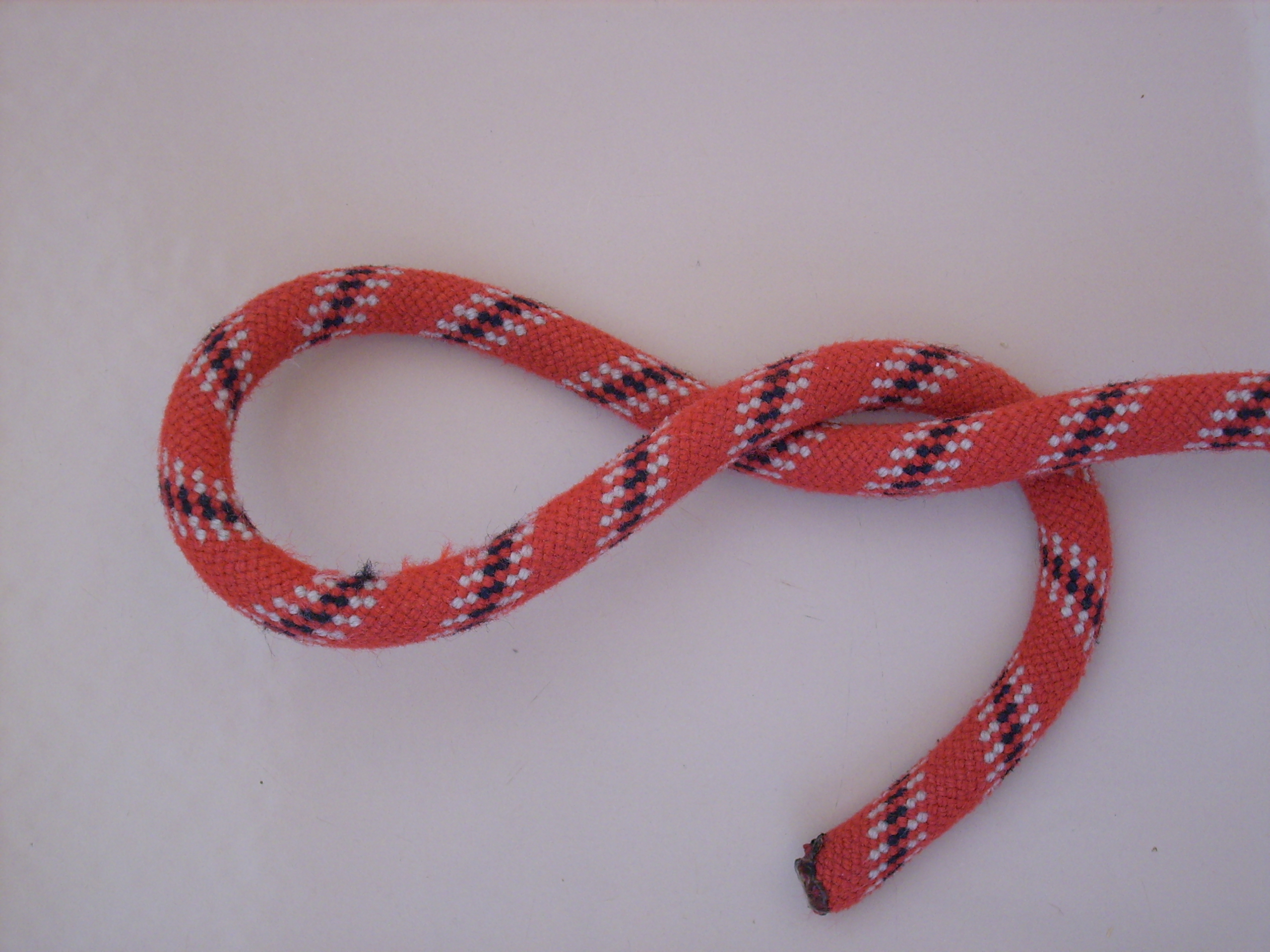 Endacht, Bucht zweimal verdreht